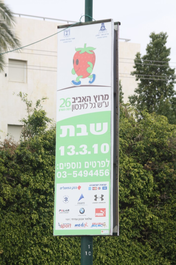 פרסומת למירוץ האביב, רמת השרון